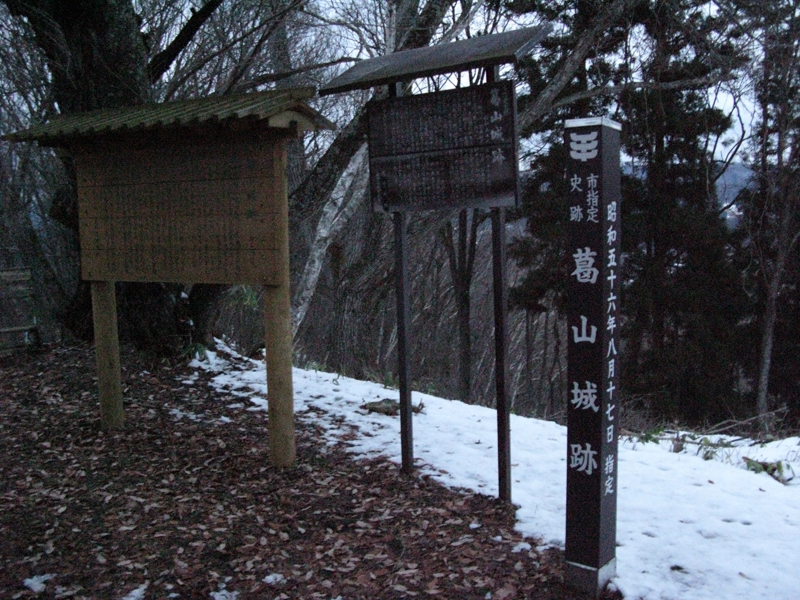 葛山城跡の標柱